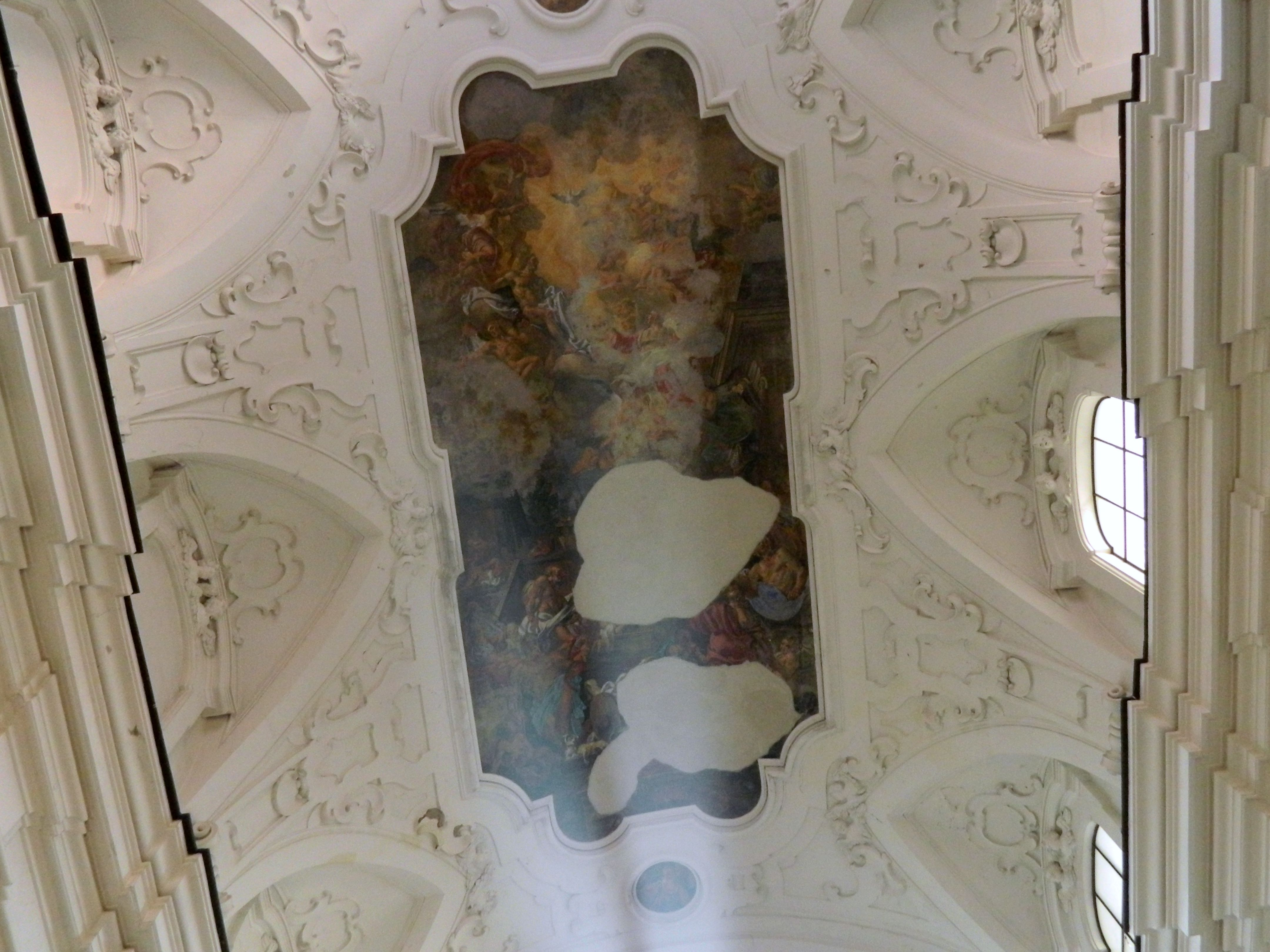 Chiesa di Santa Maria della Pace (Napoli) - Volta